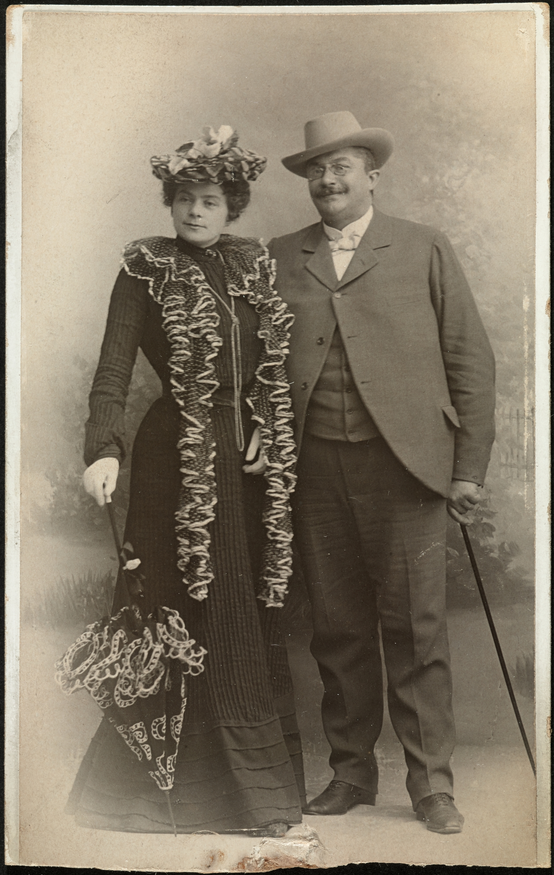 Agnete Schibsted Hansson og Olaf Mørch Hansson, 1932Depicted people: Agnethe Schibsted-Hansson and Olaf Mørch Hansson